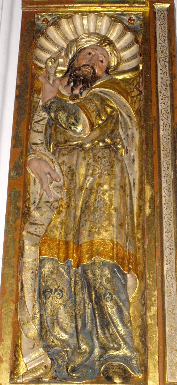 Carbonero el Mayor (Segovia) - Iglesia de San Juan Bautista